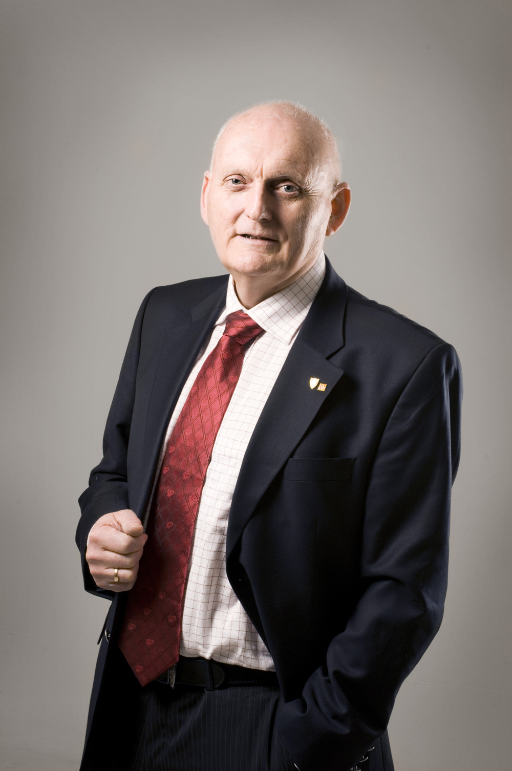 Fylkesråd for miljø, helse og fornyelse i Nord-Trøndelag, Johannes Sandstad (KrF).